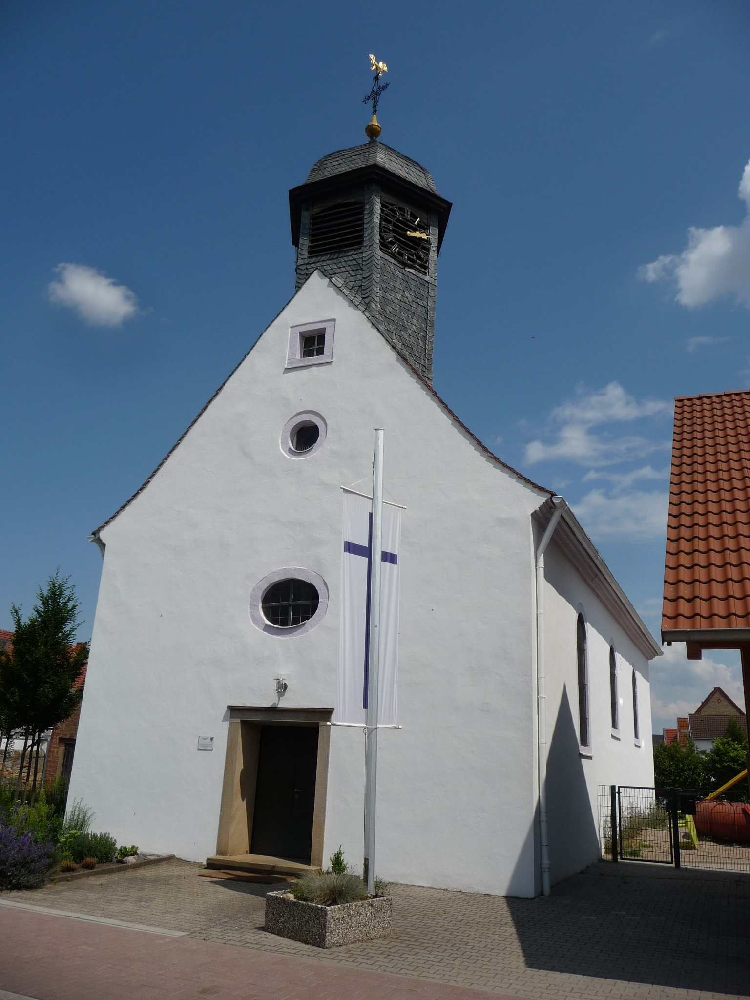 Kirche in Rödersheim-Gronau, Rheinland-Pfalz